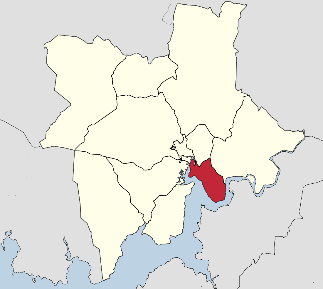 Parroquia de San Xián de Tarás en Outes